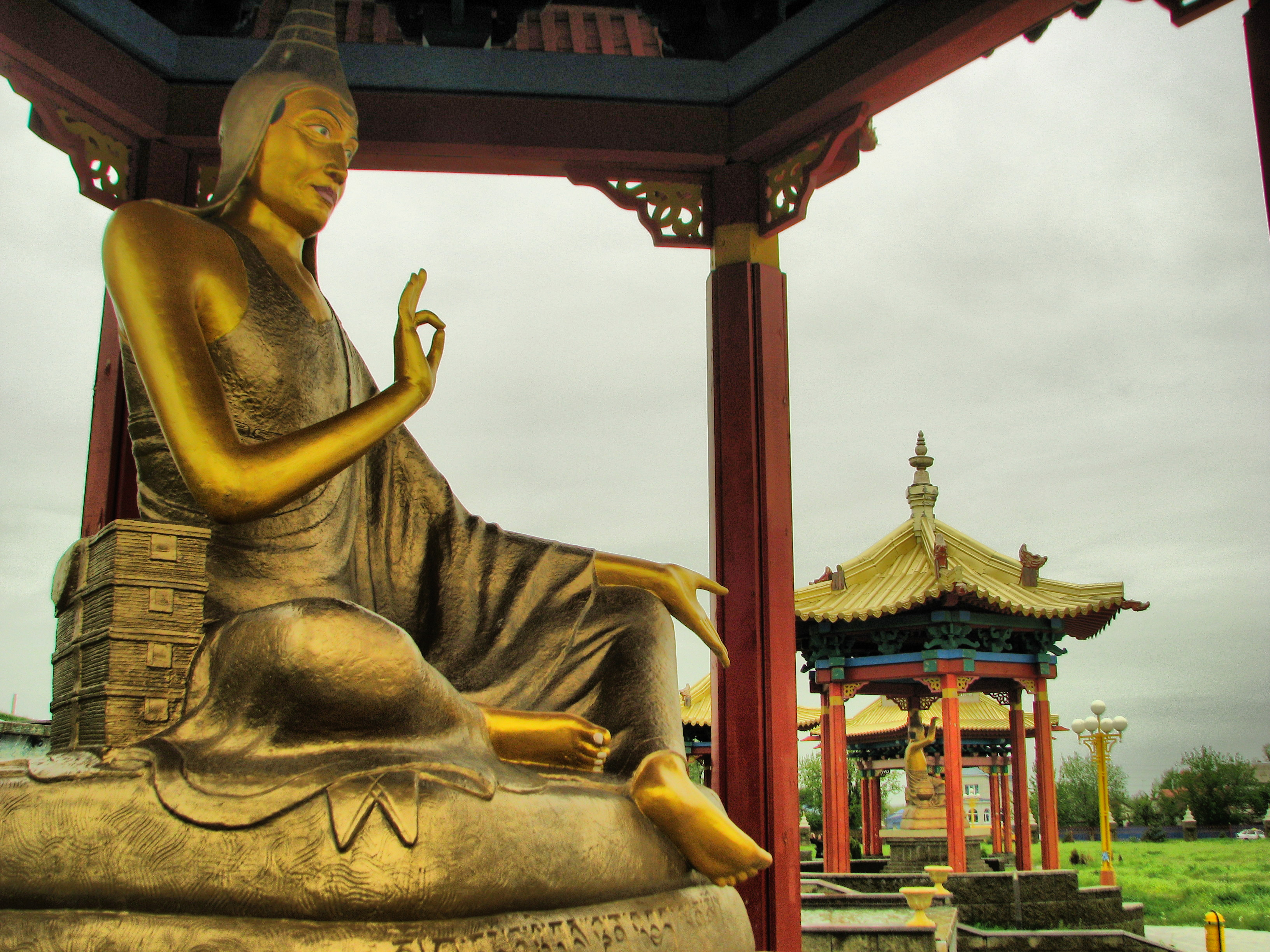 Одна из 17-ти статуй буддийских учителей вокруг Золотой обители Будды Шакьямуни. Элиста, Калмыкия